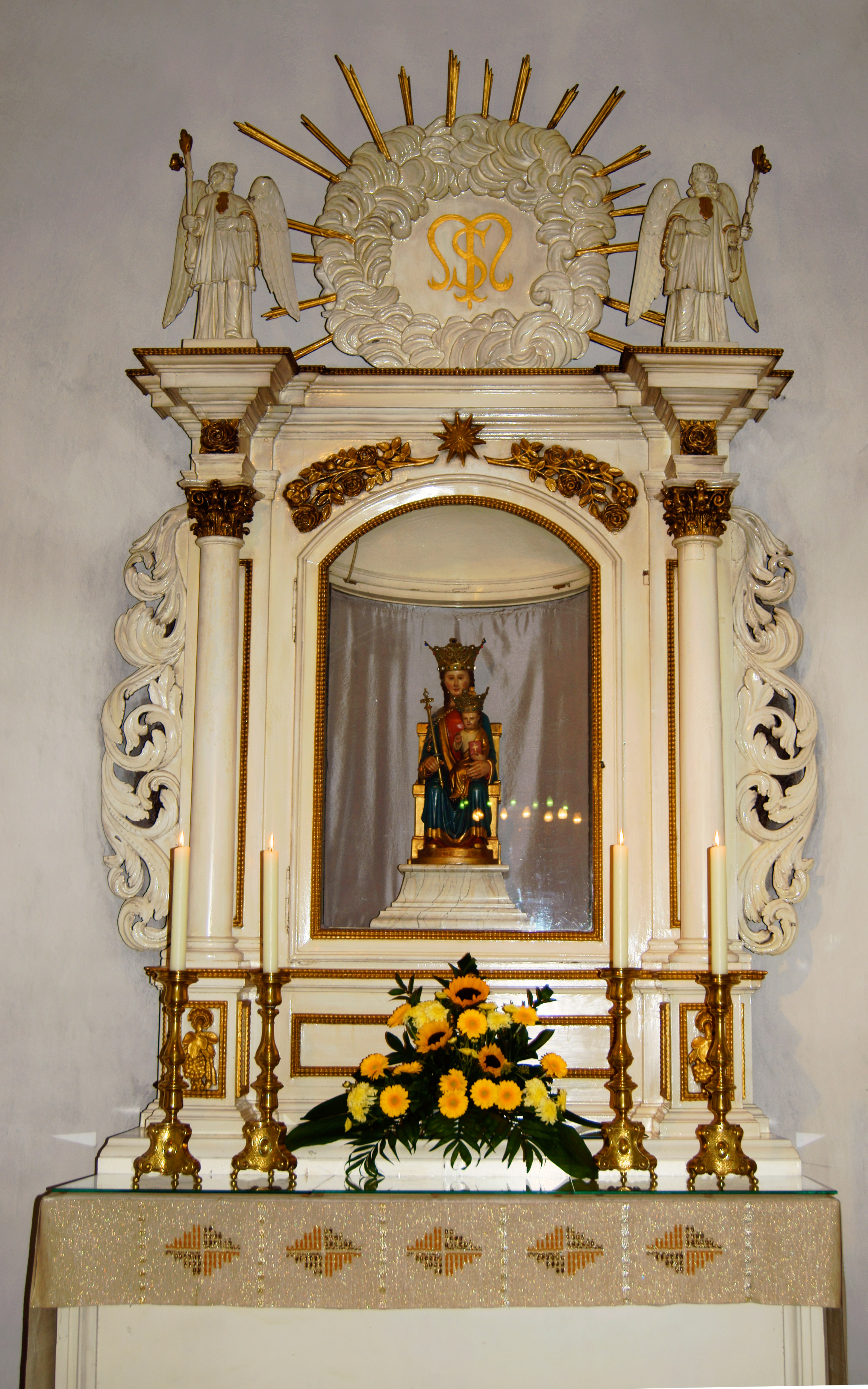 Der Altar in der Wallfahrtskapelle in Eggerode, Kreis Borken, stammt aus dem ehemaligen, 1826 abgerissenen Kloster Kleinburlo, das nur wenige Kilometer entfernt auf Darfelder Gebiet gestanden hat. This is a photograph of an architectural monument.